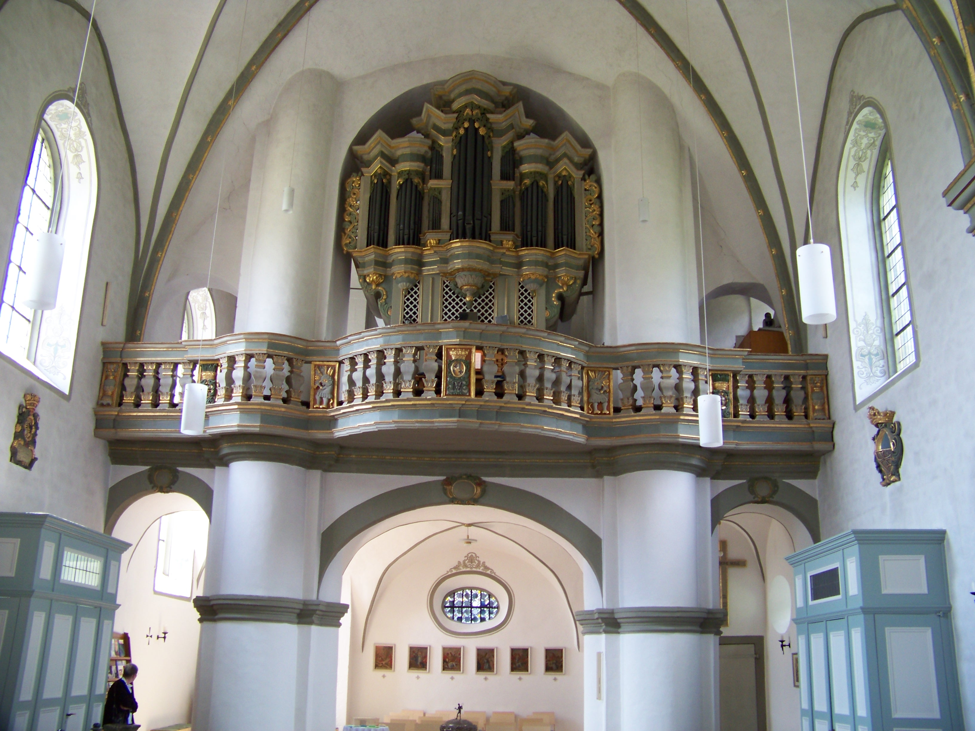 Kirche St. Margaretha, Warstein-Sichtigvor (Germany)